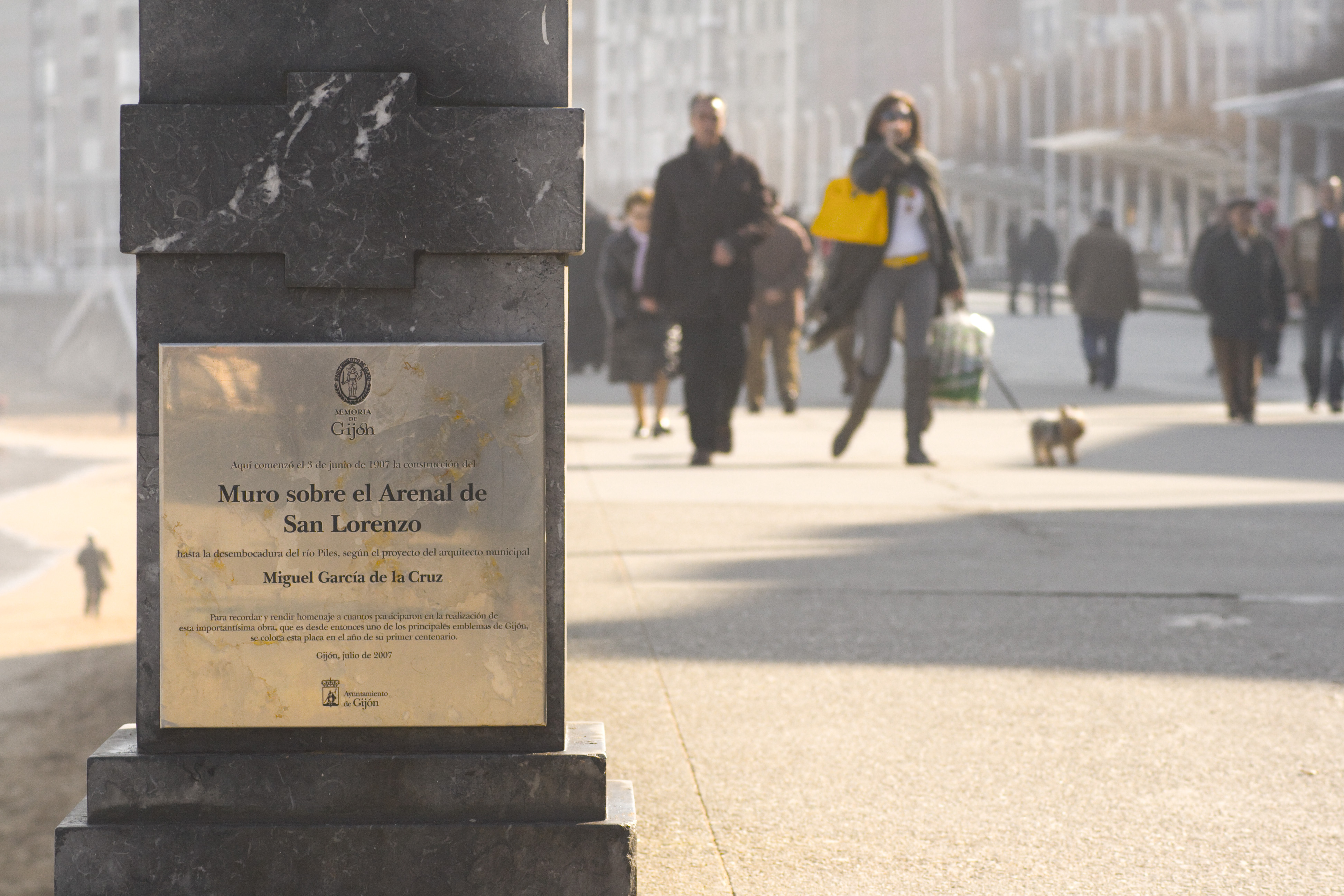 Placa instalada en 2007 en el paseo de la playa de San Lorenzo con motivo de los 100 años de la construcción del paseo y con la que rinde homenaje al arquitecto municipal Miguel García de la Cruz y a todas las personas que participaron en el proyecto.